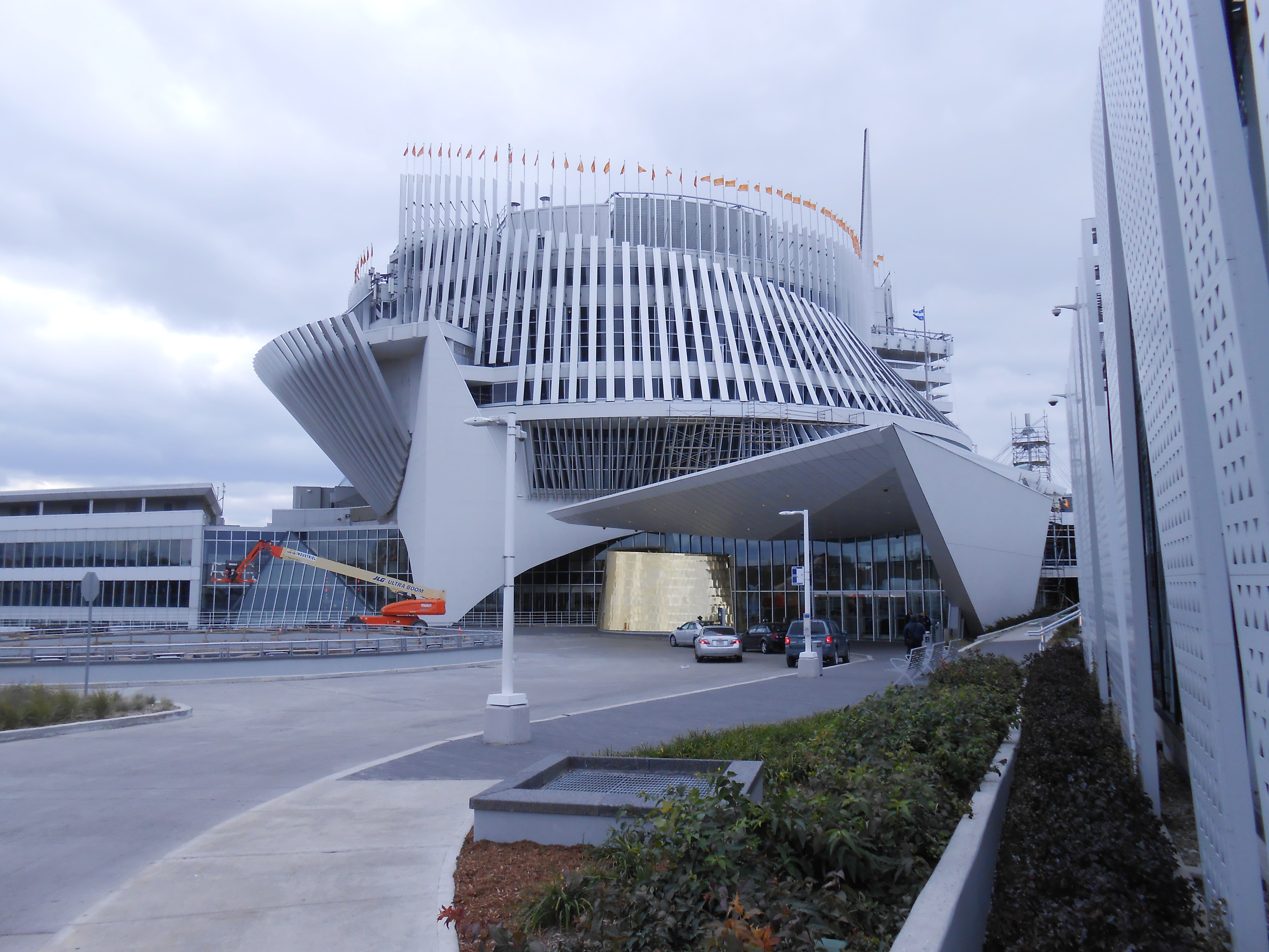 Casino de Montréal, île Notre-Dame